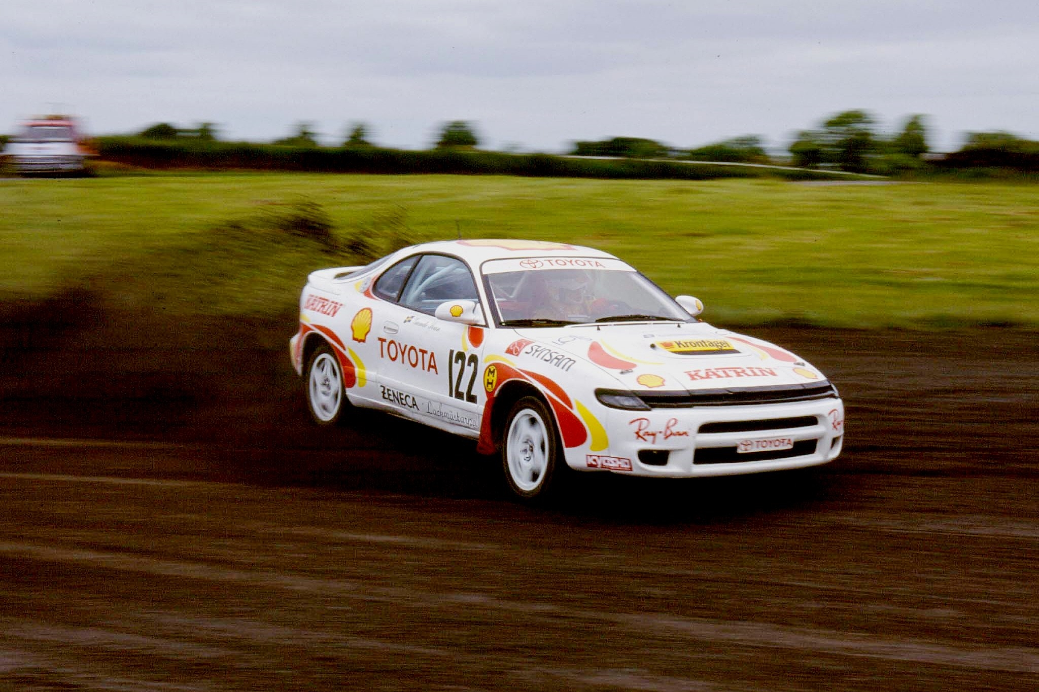 Der 4-fache Skilanglauf-Olympiasieger Gunde Svan im Toyota Celica Turbo 4WD ST185 (Gruppe N) beim Rallycross-EM-Lauf 1994 auf dem Mondello Park Circuit in Irland.